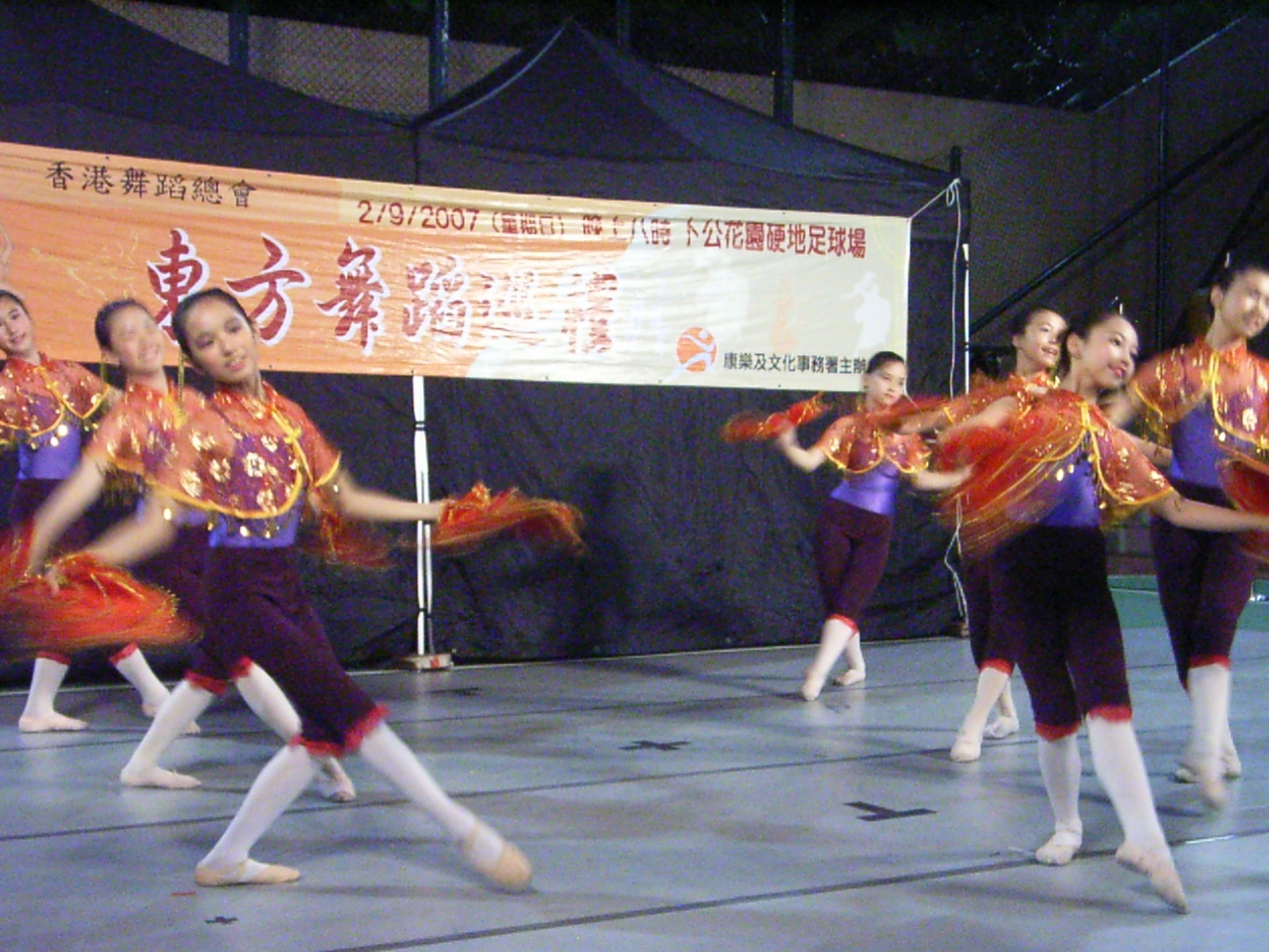 卜公花園, 民族舞蹈, Chinese Folk dance, 上環, Blake Garden, Hong Kong